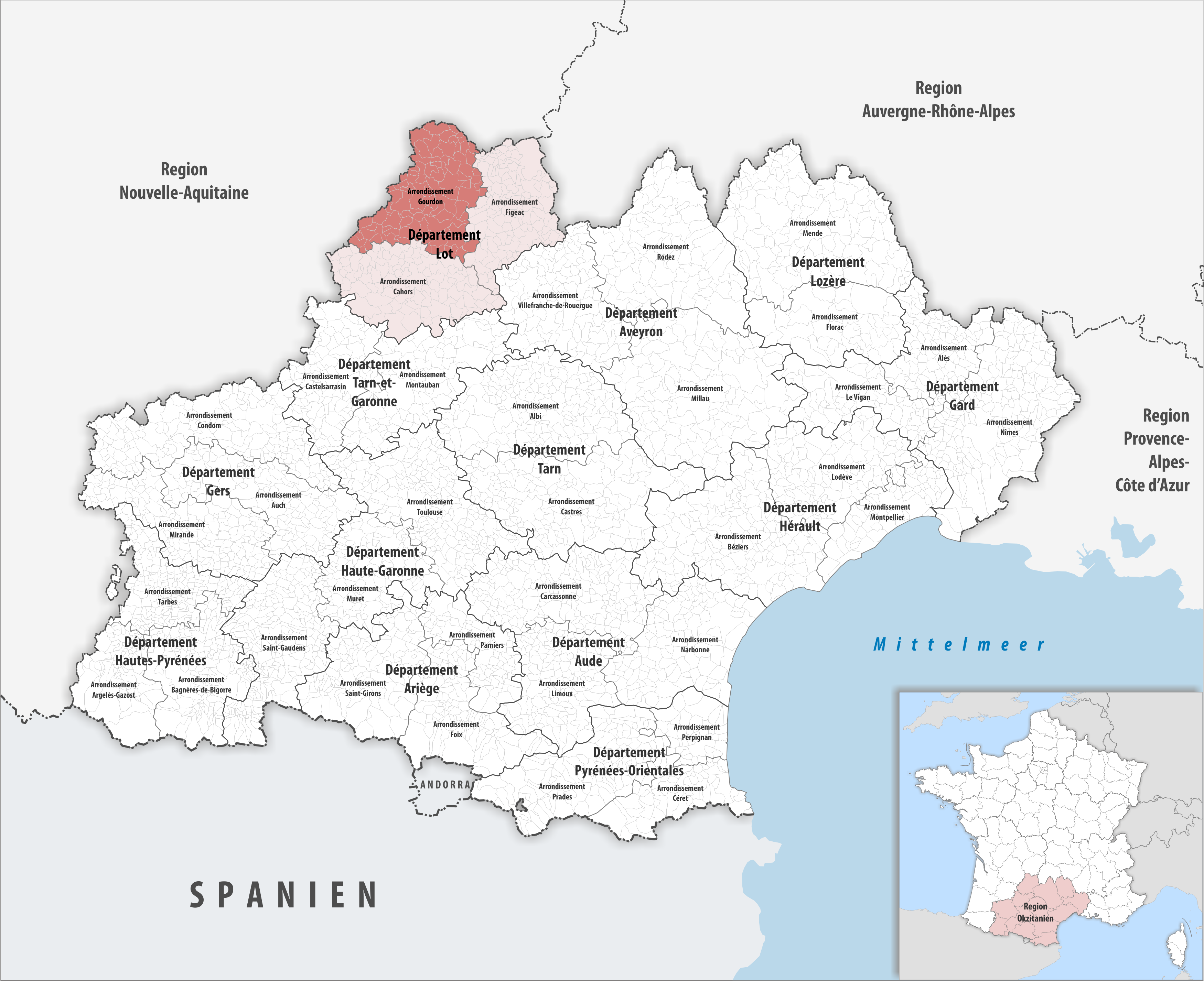 Lage des Arrondissements Gourdon